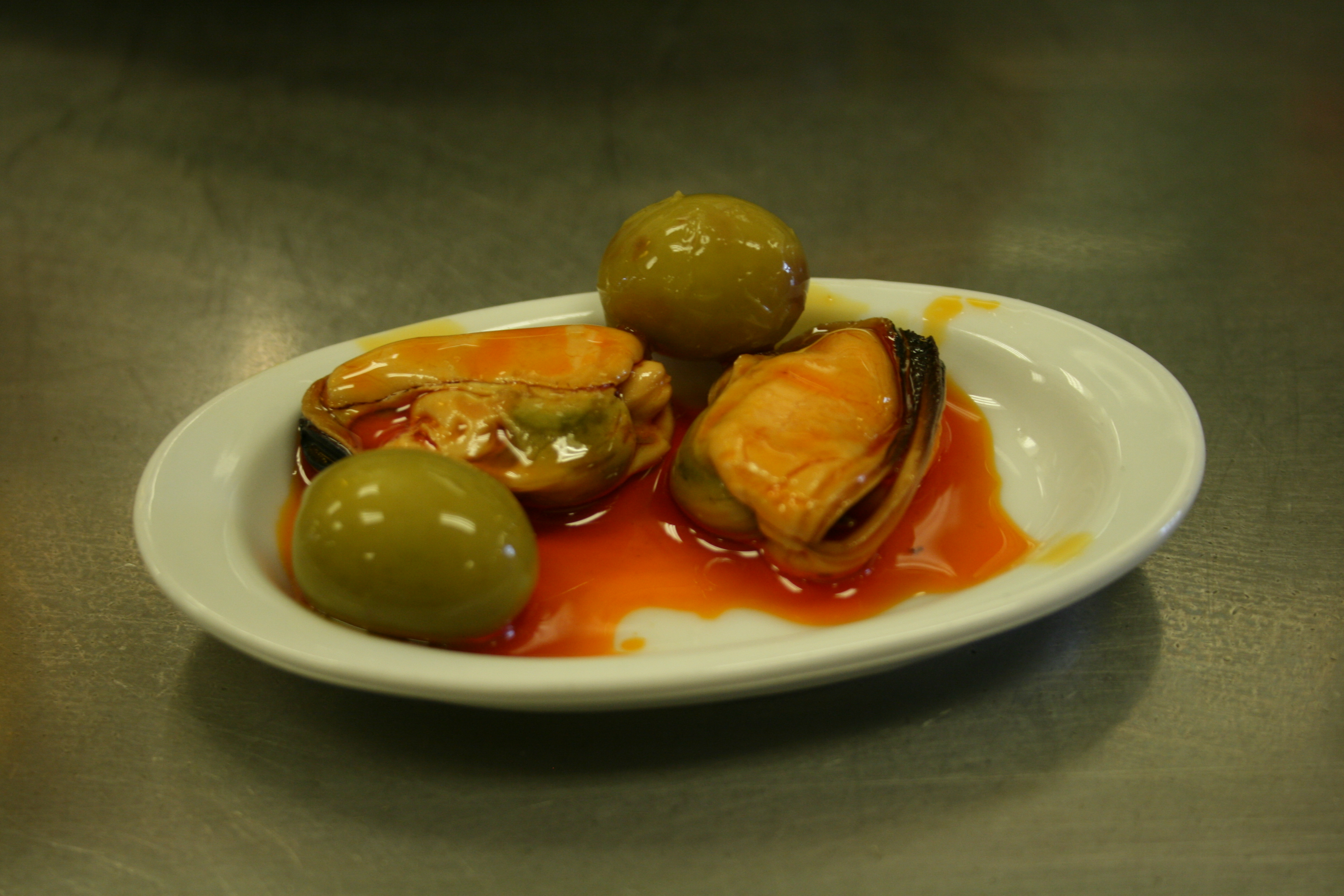 Tapa de mejillón en vinagre con aceitunas